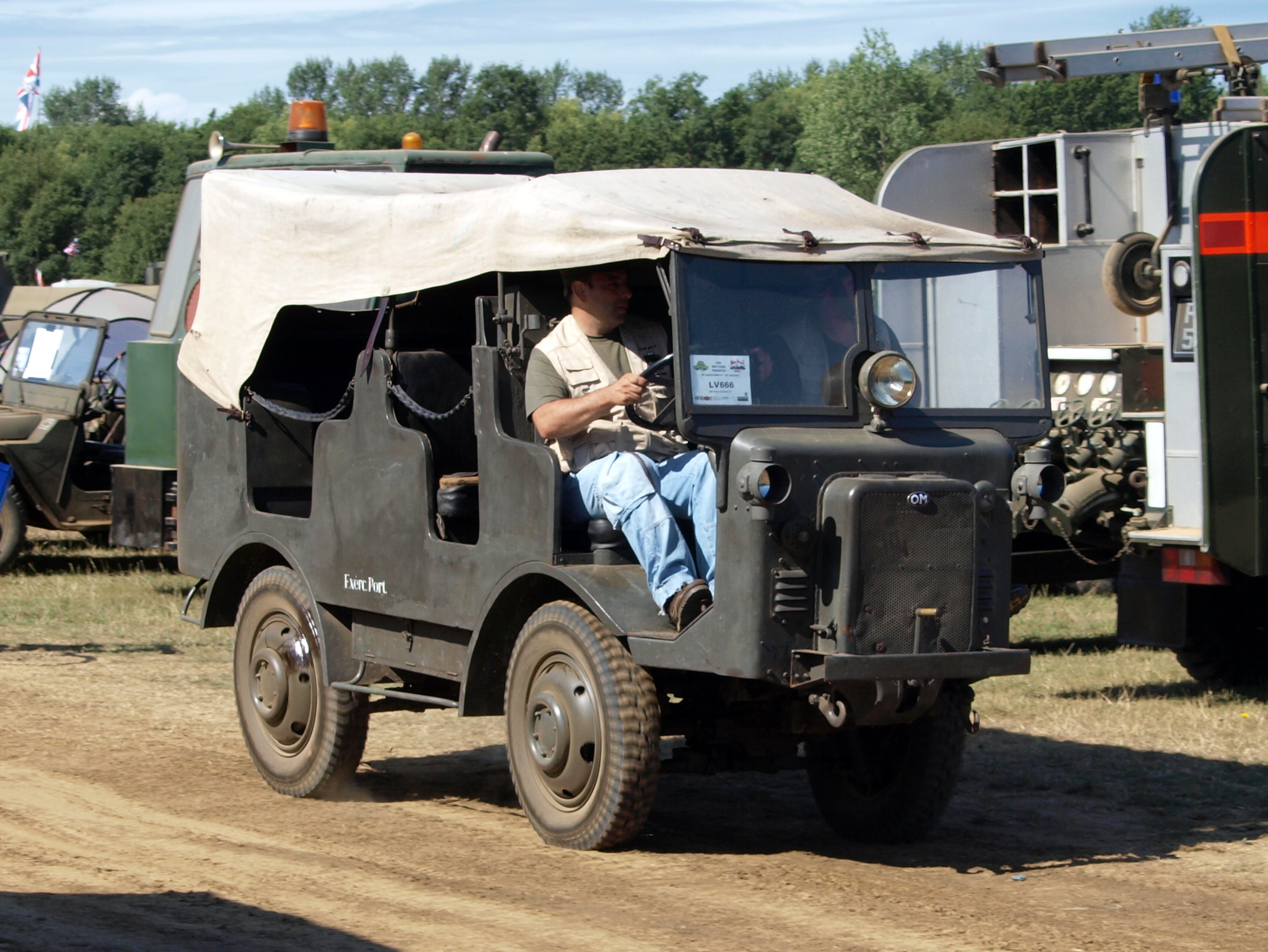 Autocarretta OM